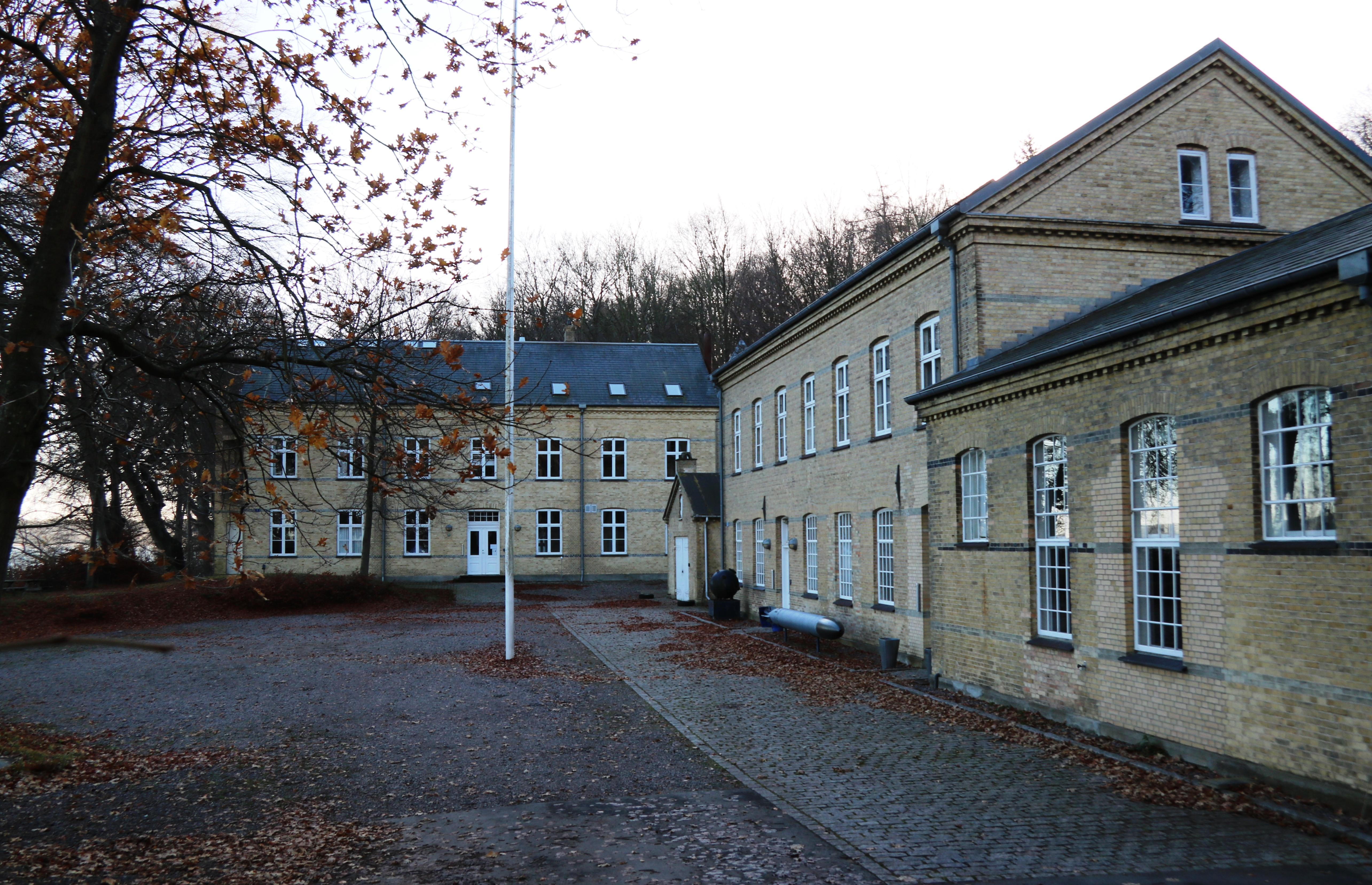 Søminestationen. Det er bygning A der ses længst væk og bygning C nærmest ved.